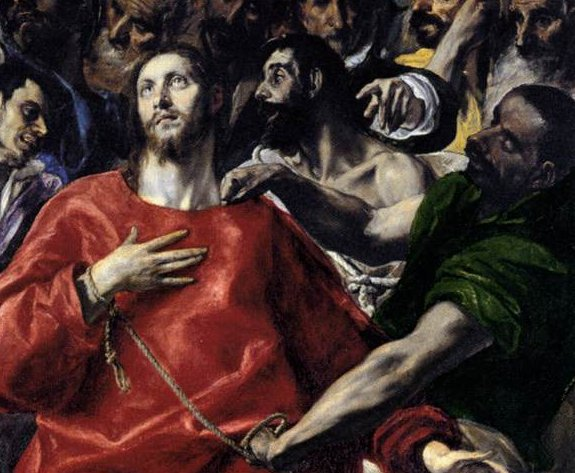 Detalle del cuadro El Expolio, pintado por El Greco y conservado en la sacristía de la catedral de Toledo, (España).